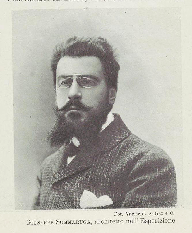 Arch. Giuseppe Sommaruga (1867-1917)